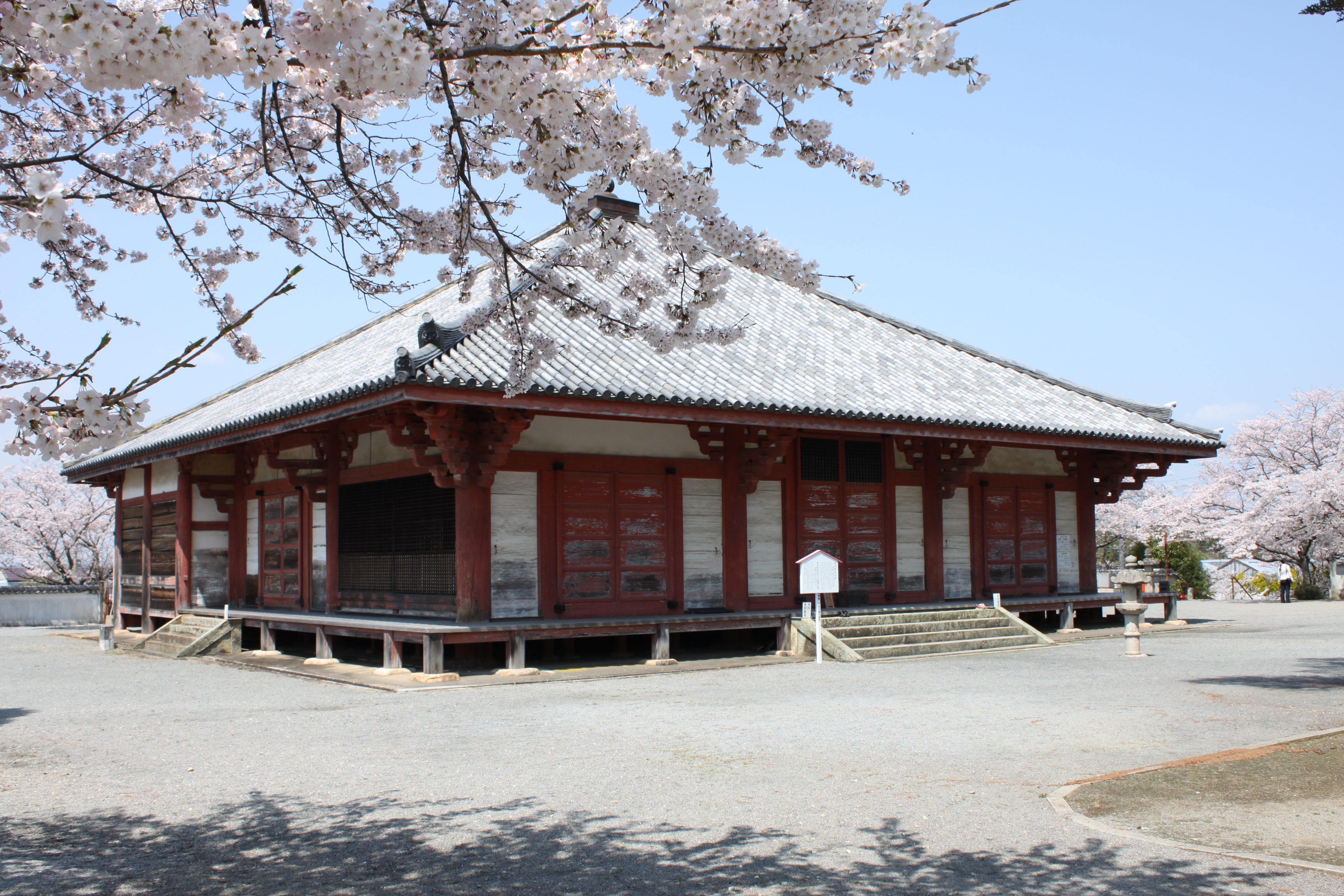 国宝浄土寺（浄土堂）